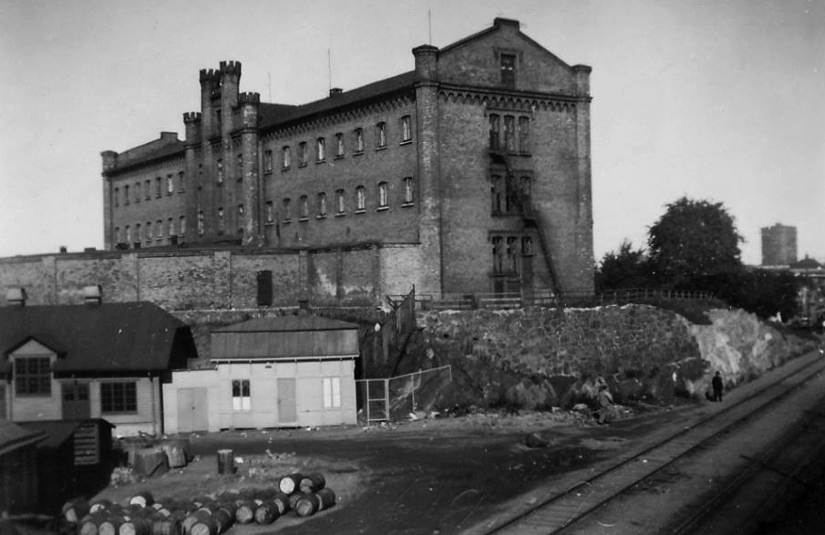 Länscellfängelset, Göteborg